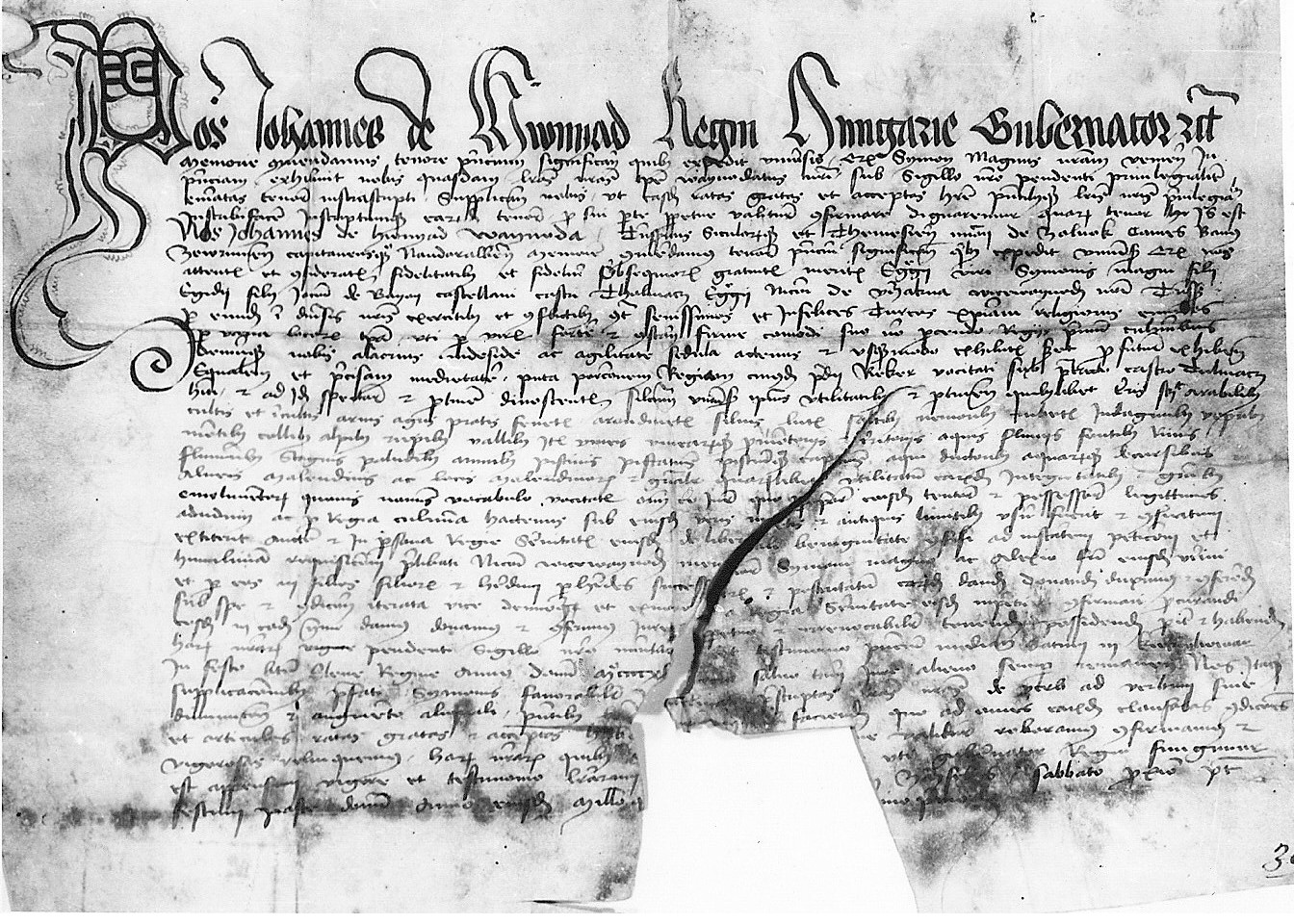 La première attestation documentaire du village a été découverte dans un papier de donation du voïévode Jean de Hunedoara, daté le 22 mai 1443.